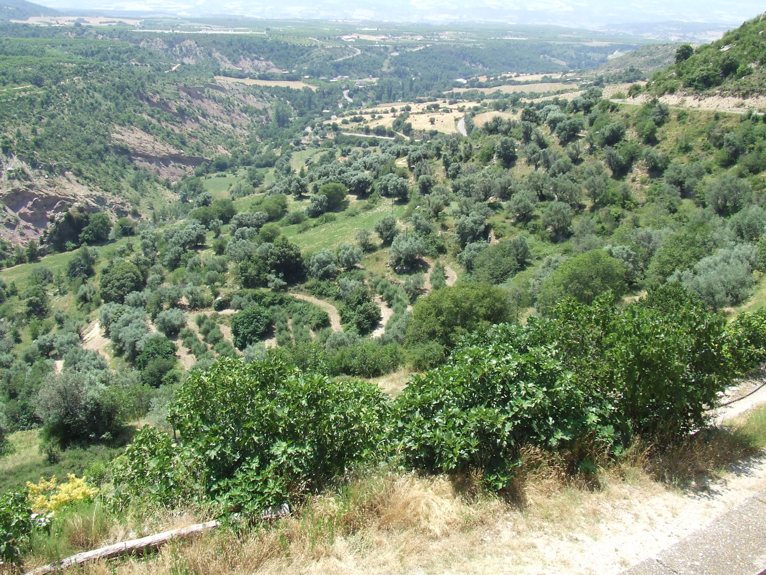 Les Trilles (Abella de la Conca, Pallars Jussà)